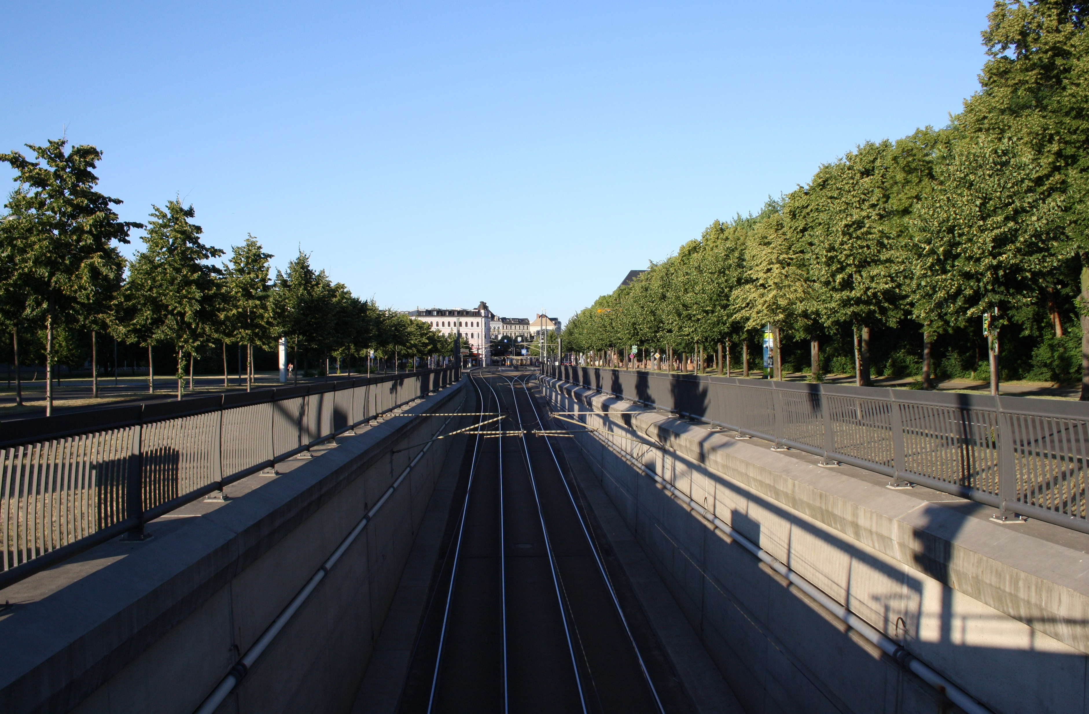 Jahnallee von der Kreuzung Marschnerstraße in Richtung Waldplatz